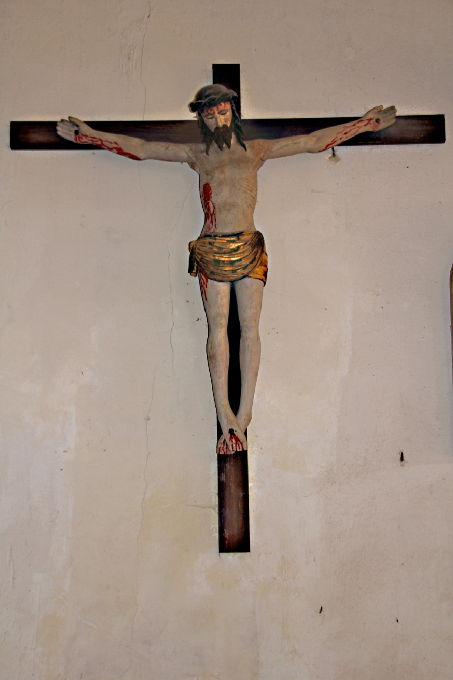 Grand christ en croix, probablement retiré d'une poutre de gloire.